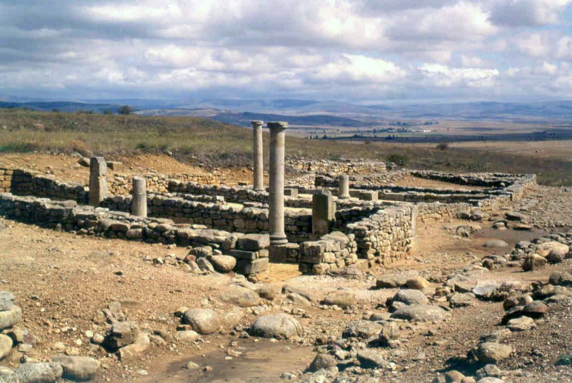 Vista de las excavaciones arqueológicas de Numancia (Soria, España).